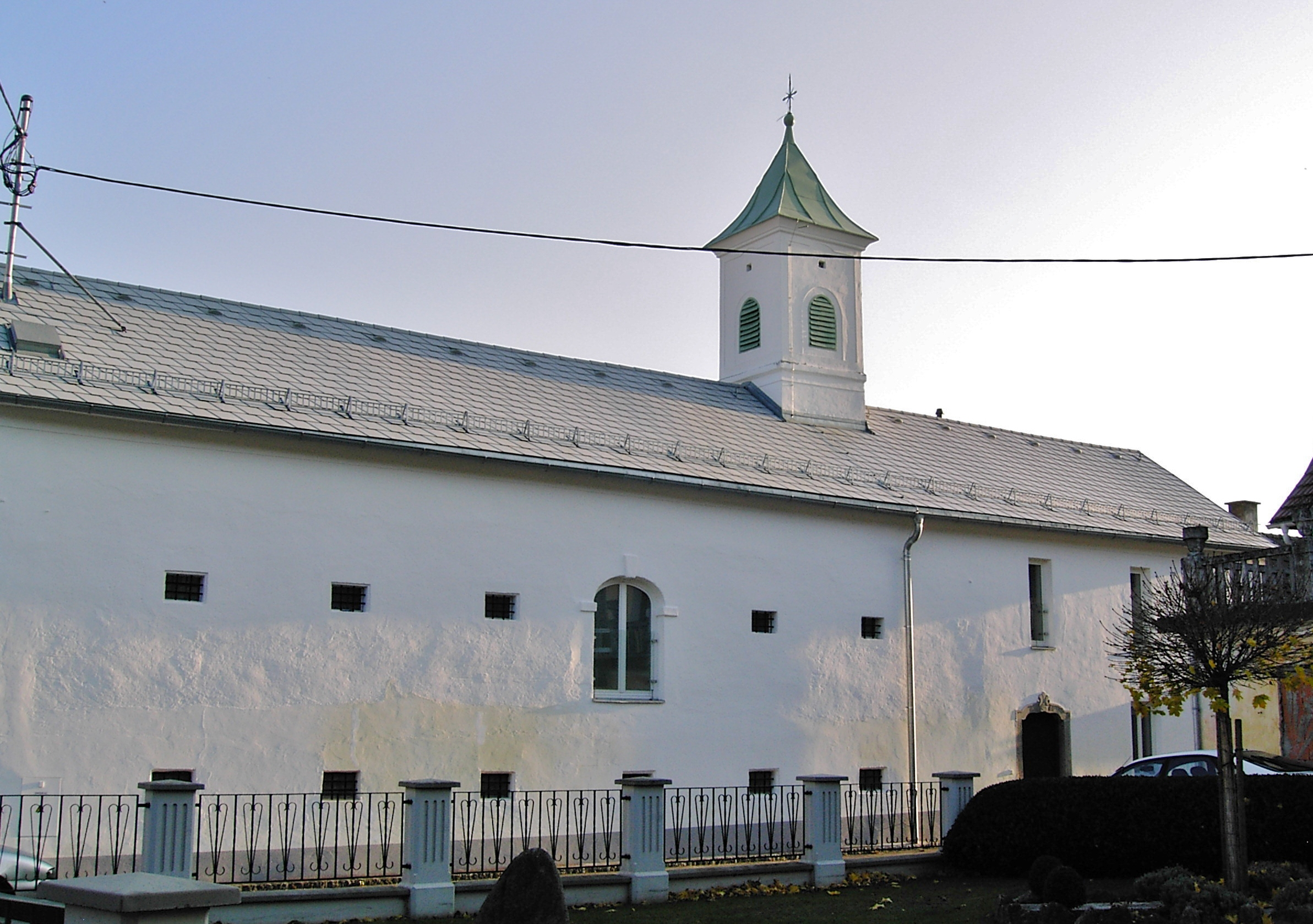 Sierning Taverne zu Neuzeug Theresia-Helm-Straße 28, Wirtschaftsgebäude mit charakteristischem Dachtürmchen, Ansicht von Werndlgasse aus